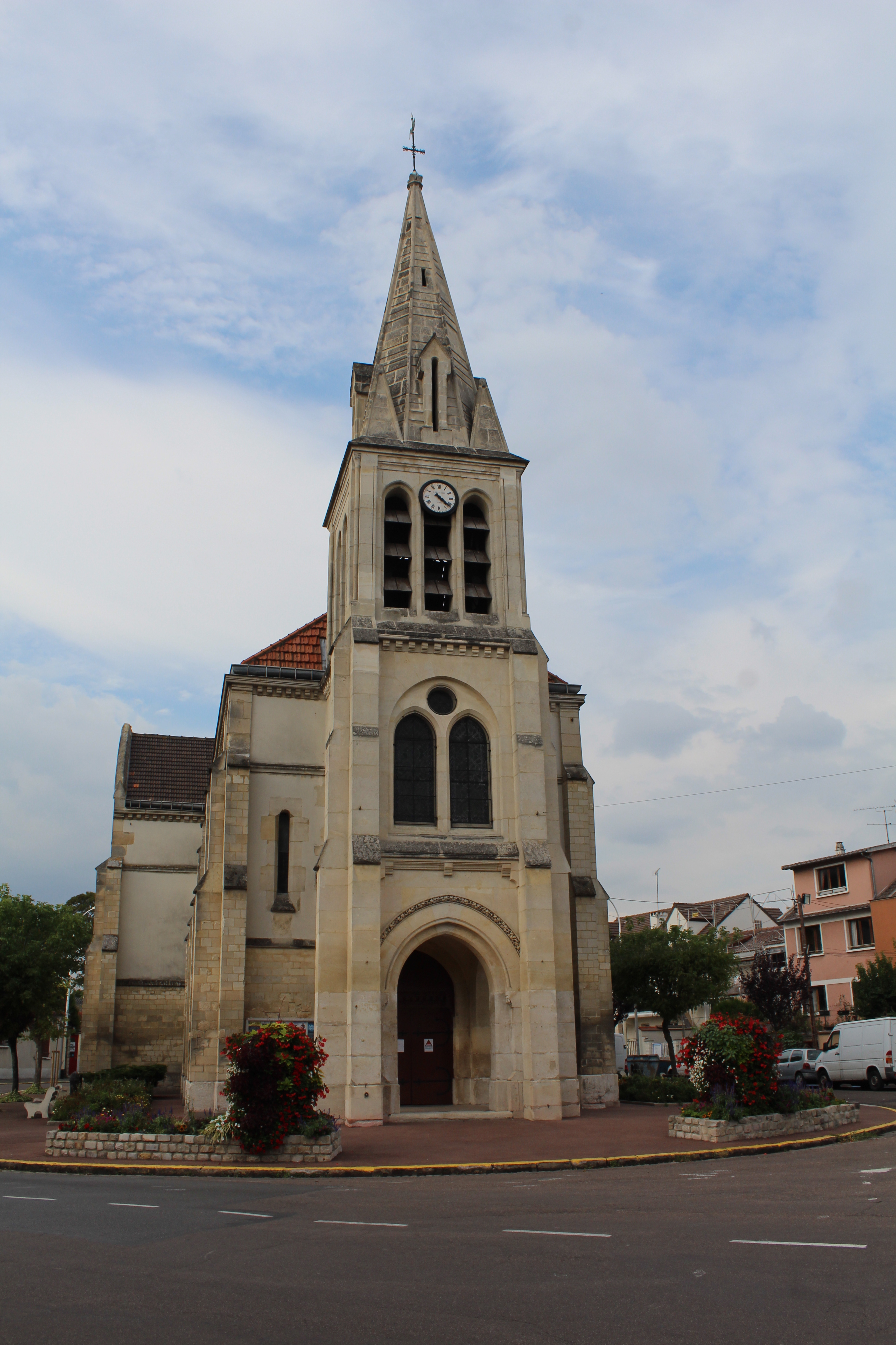 Église Saint-Henri de Neuilly-Plaisance.